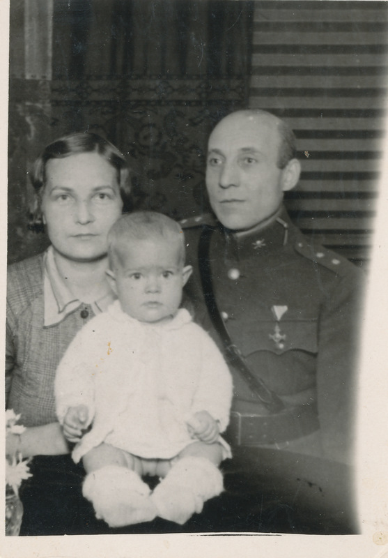 Eduard Grosschmidt 1930ndatel aastatel abikaasa ja tütrega